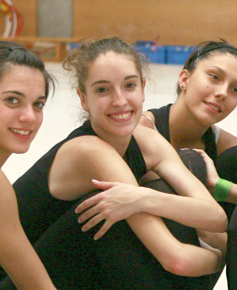 Verónica Ruiz en el CAR de Madrid en el año 2007.